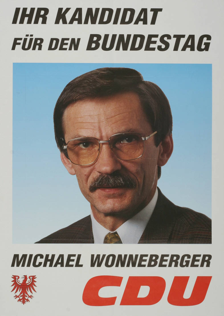 Ihr Kandidat für den Bundestag Michael Wonneberger CDU Abbildung: Porträtfoto - Brandenburgischer Adler Plakatart: Kandidaten-/Personenplakat mit Porträt Objekt-Signatur: 10-001: 4036 Bestand: Plakate zu Bundestagswahlen (10-001) GliederungBestand10-18: Plakate zu Bundestagswahlen (10-001) » Die 13. Bundestagswahl am 16. Oktober 1994 » CDU » Mit Porträtfoto Lizenz: KAS/ACDP 10-001: 4036 CC-BY-SA 3.0 DE